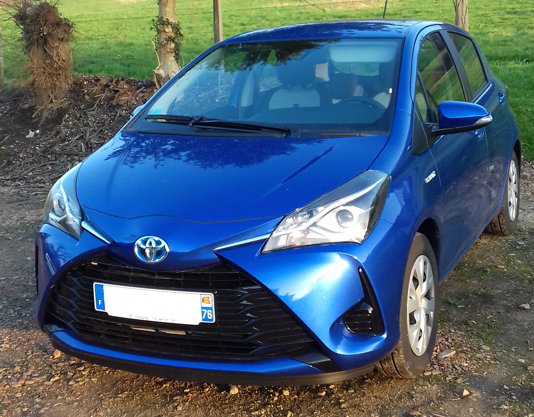 Toyota Yaris 100H finition France Bleu Nébula / production Novembre 2017